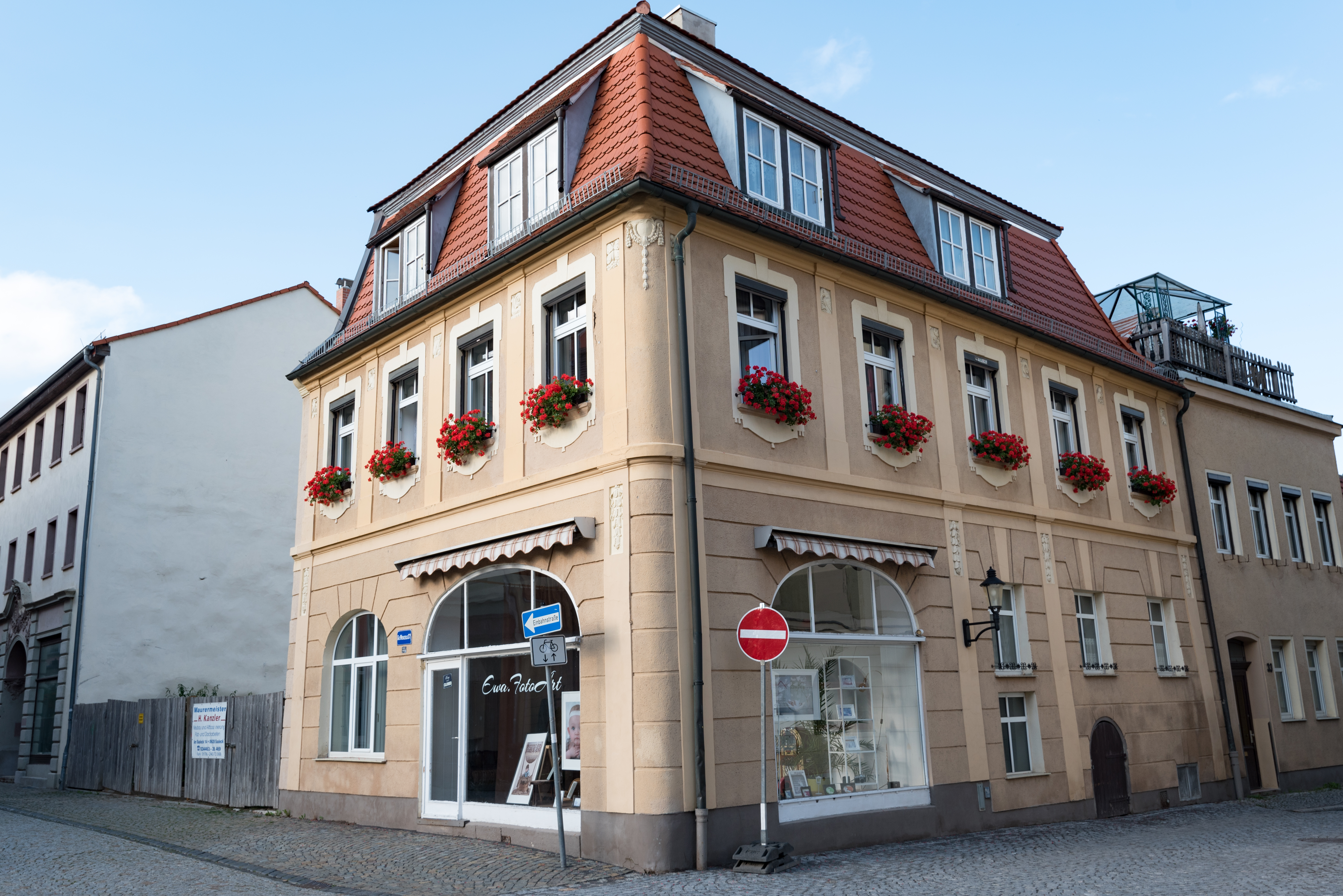 Naumburg (Saale), Wenzelsstraße 33